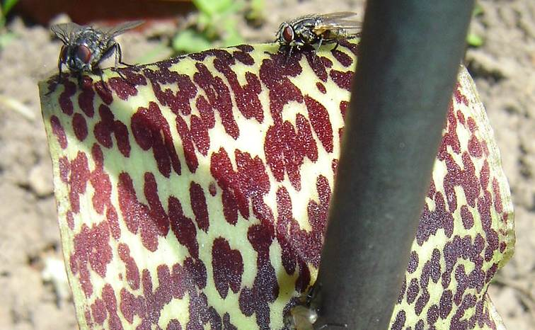 Typhonium venosum